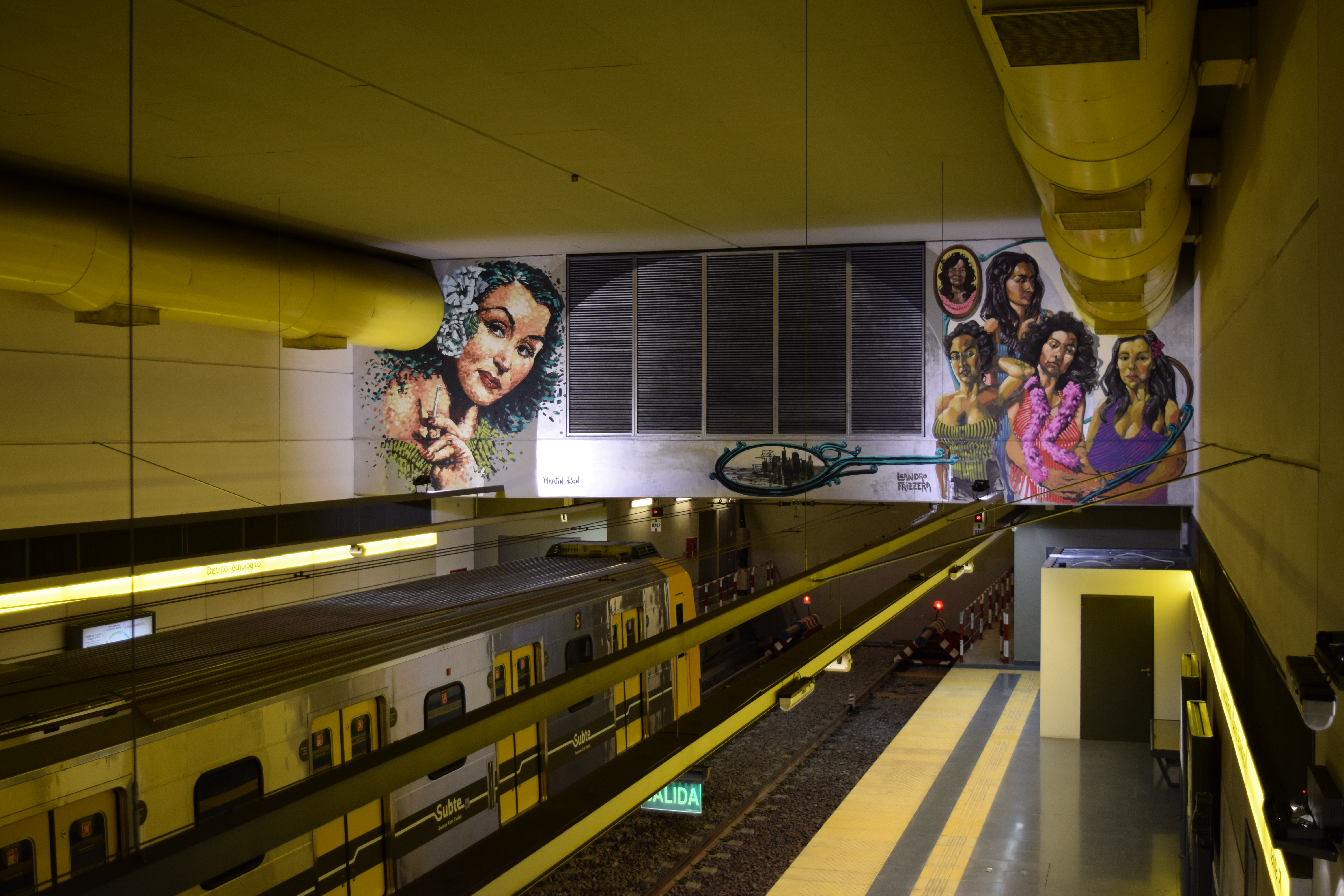 Mural de la Est. Hospitales hacia el sur.